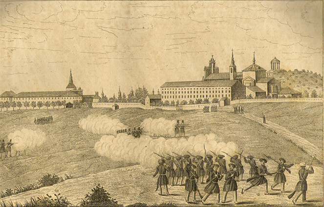 Carlistas en Madrid